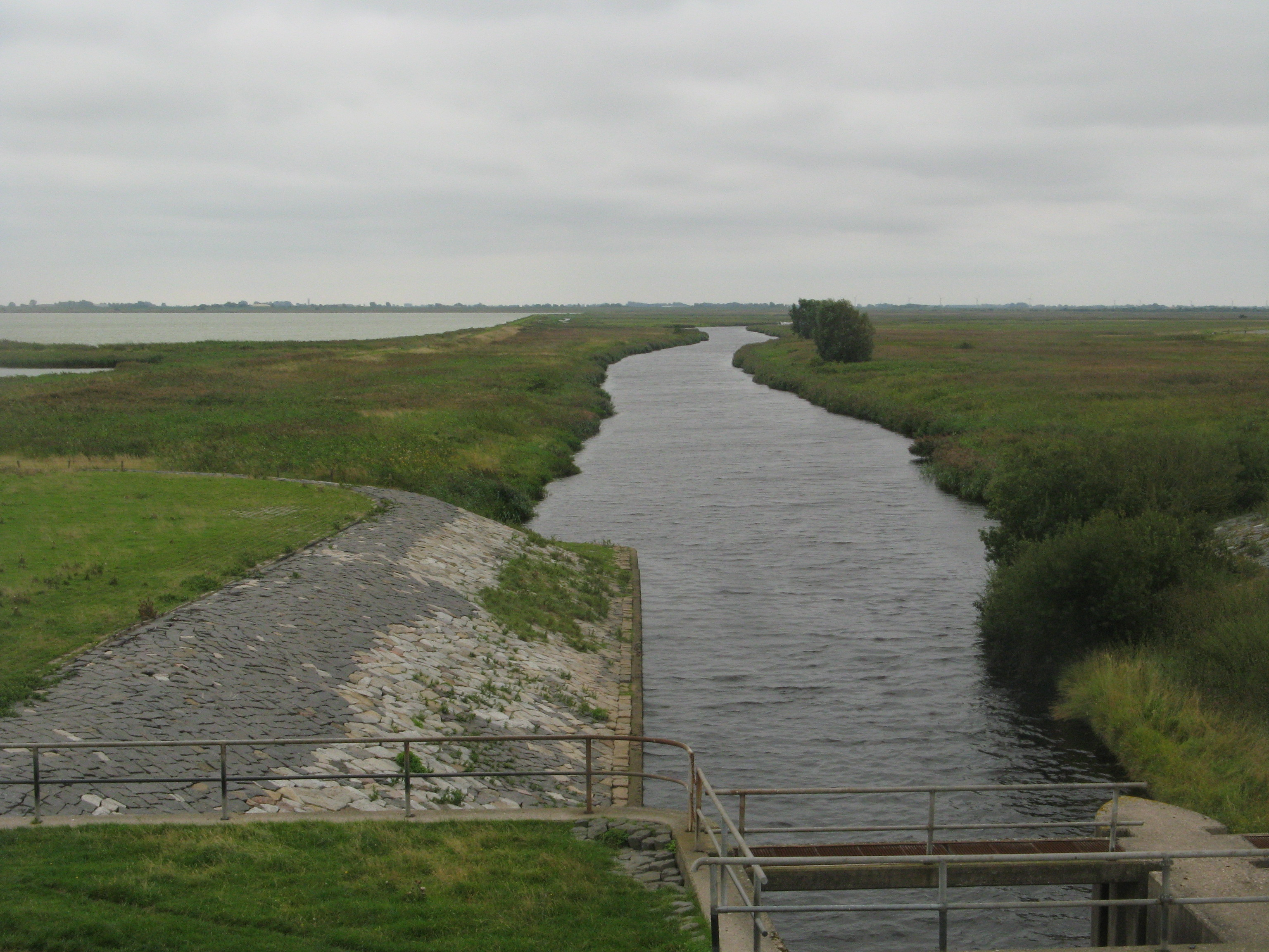 arlau river inside the beltringharder koog